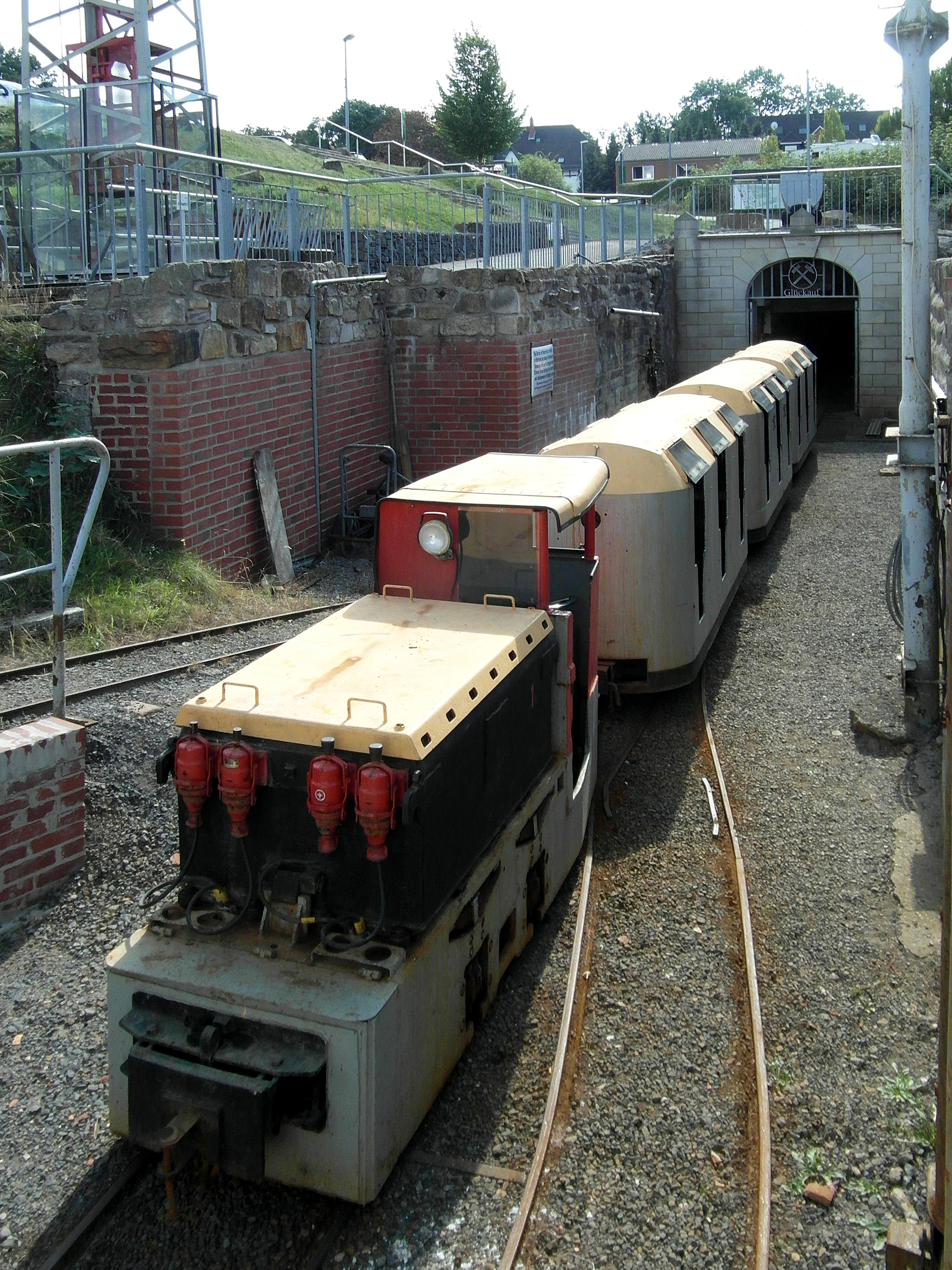 Ein Zug der Grubenbahn steht vor dem Mundloch des Klosterstollens Barsinghausen.